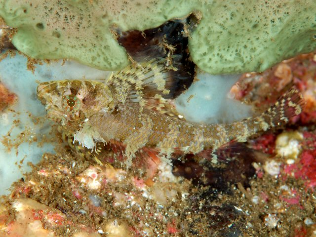 コクテンニセヘビギンポ Norfolkia brachylepis